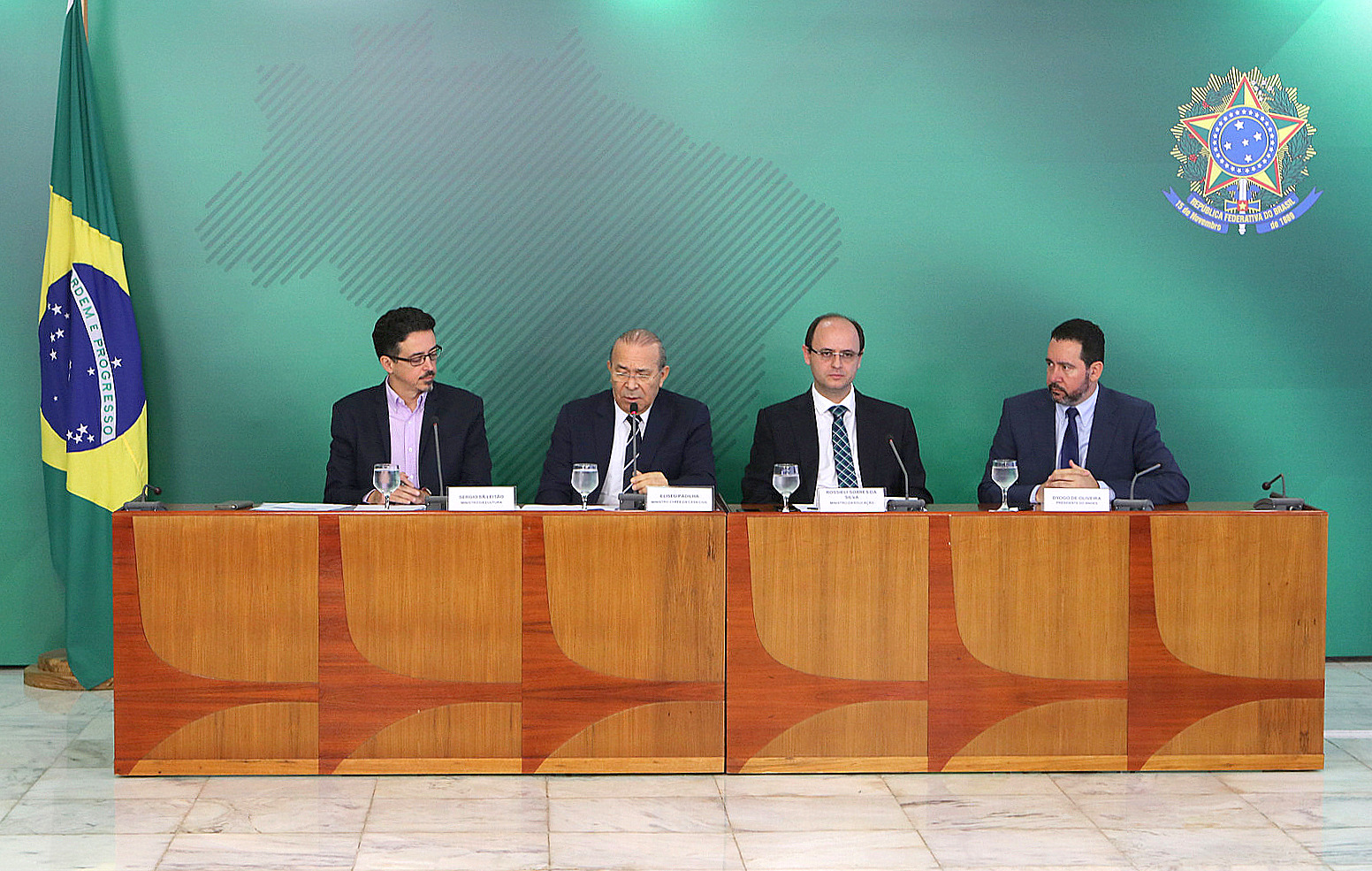 Em reunião nesta terça-feira (4/9) no Palácio do Planalto com o presidente da República Michel Temer, um comitê gestor interministerial chancelado pelo presidente definiu as principais medidas para recuperar o Museu Nacional e o Sistema Nacional de Museus como um todo. Composto pelos Ministérios da Cultura (MinC), da Educação, das Relações Exteriores, da Casa Civil e de um grupo de bancos públicos, o Comitê divulgou ações prioritárias, entre as quais sanção de Medida Provisória que criará a Lei de Fundos Patrimoniais, que vai regulamentar o financiamento de museus e outras instituições a partir de doações privadas de pessoas jurídicas e físicas, modalidade conhecida como endowment. Neste modelo de financiamento, o dinheiro ou bens arrecadados são mantidos pelo fundo, onde o recurso somente pode ser investido dentro da instituição. Os doadores não tem nenhum tipo de gerência sobre como o dinheiro deve ser aplicado. Sérgio Sá Leitão/Ministro da Cultura Eliseu Padilha/Ministro da Casa Civil Rossieli Soares/Ministro da Educação Dyogo Oliveira/Presidente do BNDES 04/09/2018 Fotos: Ronaldo Caldas/ASCOM/MinC